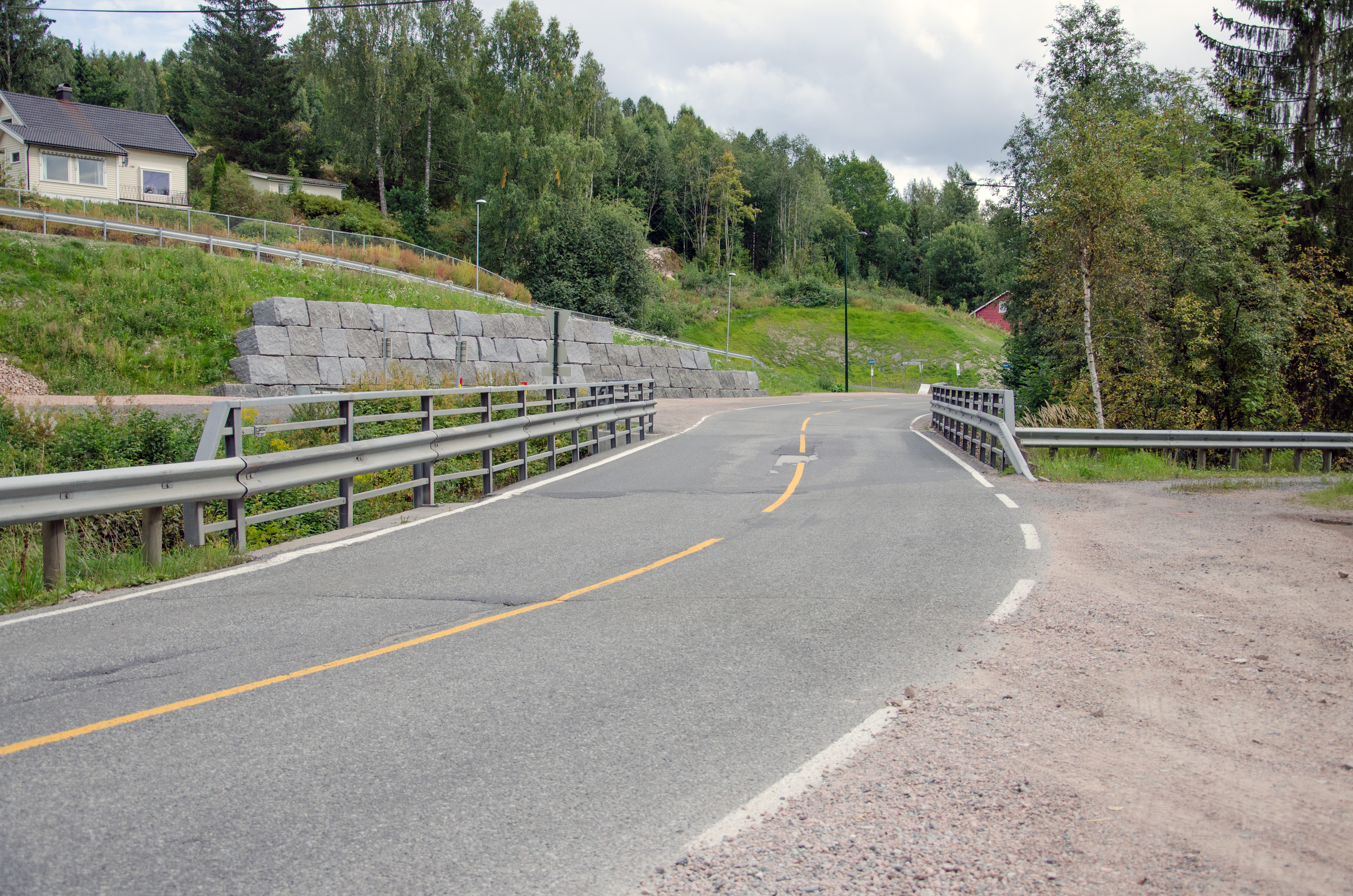 Fylkesvei 11 Hurumveien